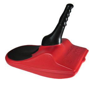 Original Mini-Bob